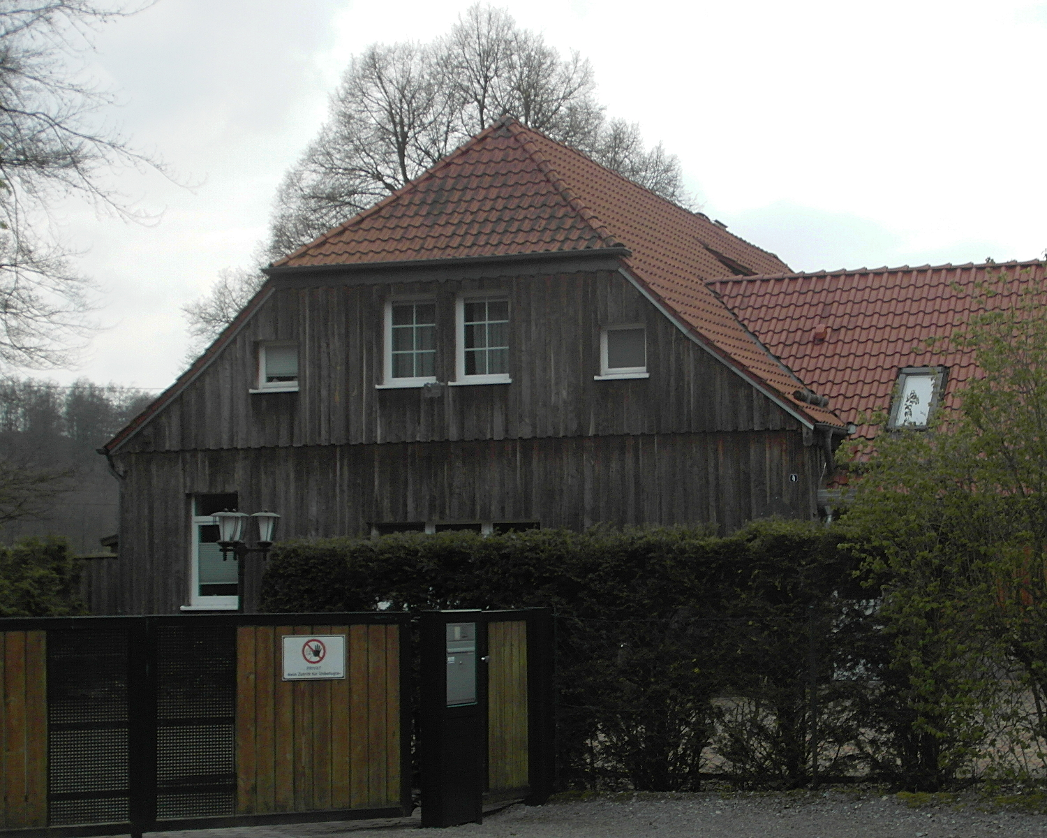 Im 19. Jahrhundert war der verbretterte Fachwerkbau das Forstamt Köllnischfeld. Nebenbei betrieb die Förstersfrau einen Ausschank. Im 20. Jahrhundert Ausflugslokal, das Forstamt war ausgezogen. Heute Wohnhaus.